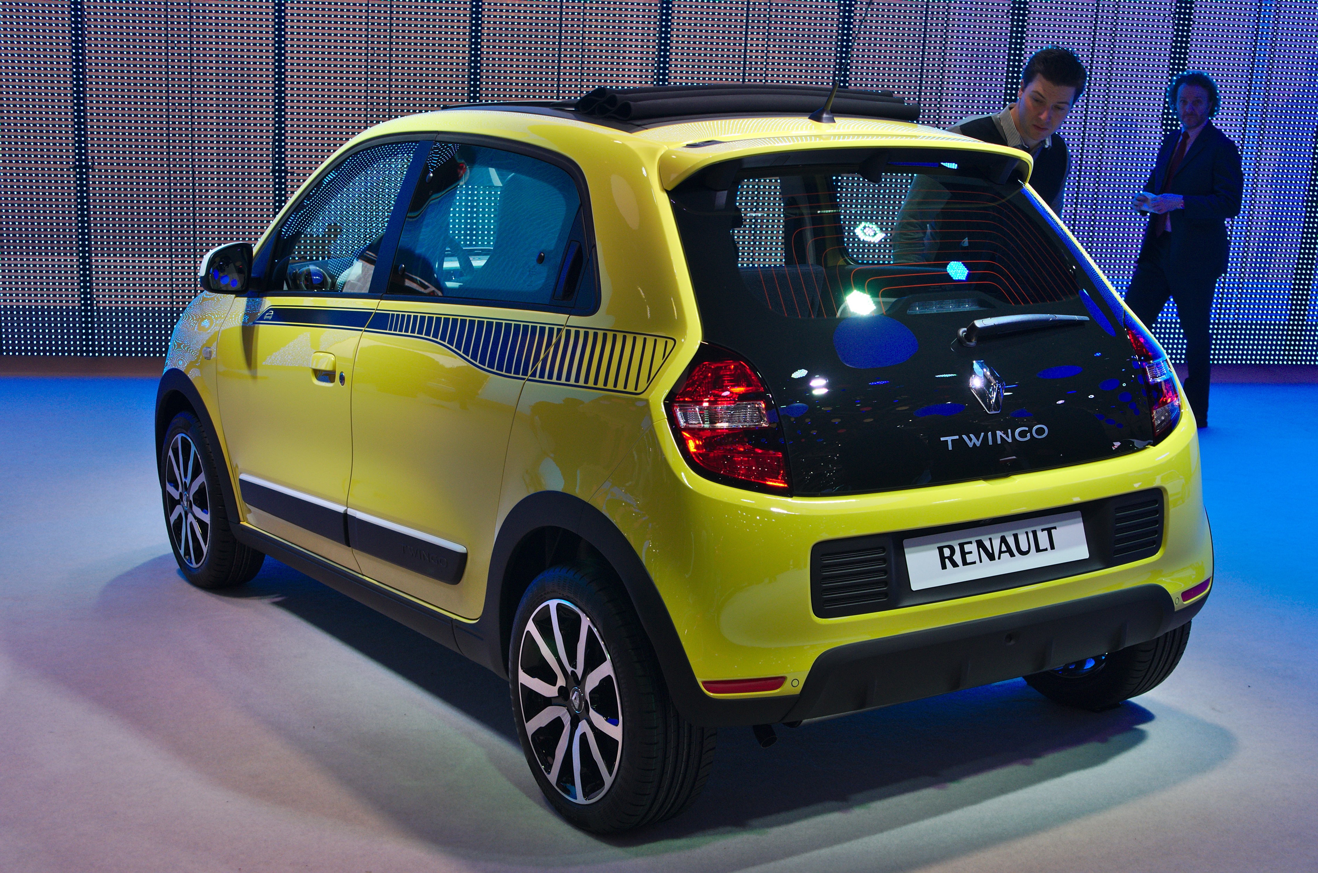 Salon de l'auto de Genève 2014 - 20140305 - Renault